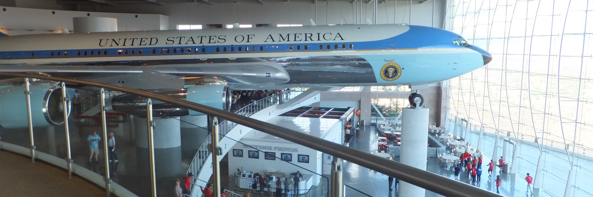 සිංහල: ක්‍රි.ව. 1972 සිට 2001 දක්වා අ.එ.ජනපදවල ජනාධිතිවරු 7දෙනෙක එයා ෆෝස් වන් ලෙස භාවිතකල යානය.